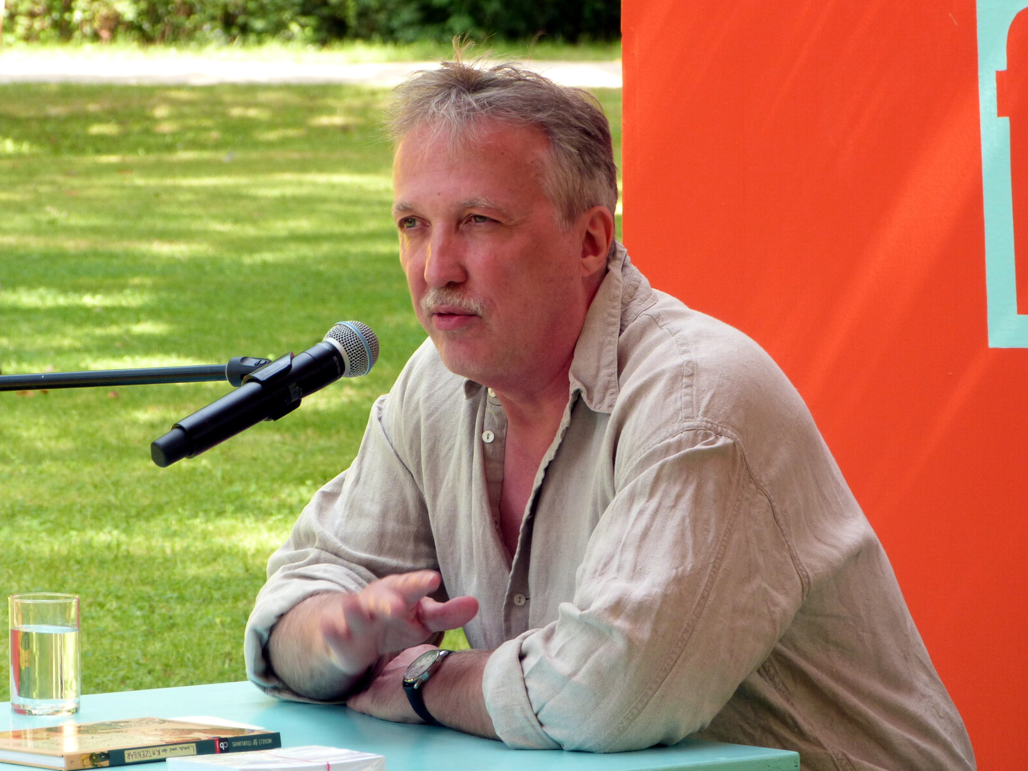 Der Schriftsteller und Kinderbuchautor Udo Weigelt bei einer Lesung auf dem Erlanger Poetenfest 2017.